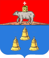 Герб города Далматово (Пермское наместничество) (1783 г.)